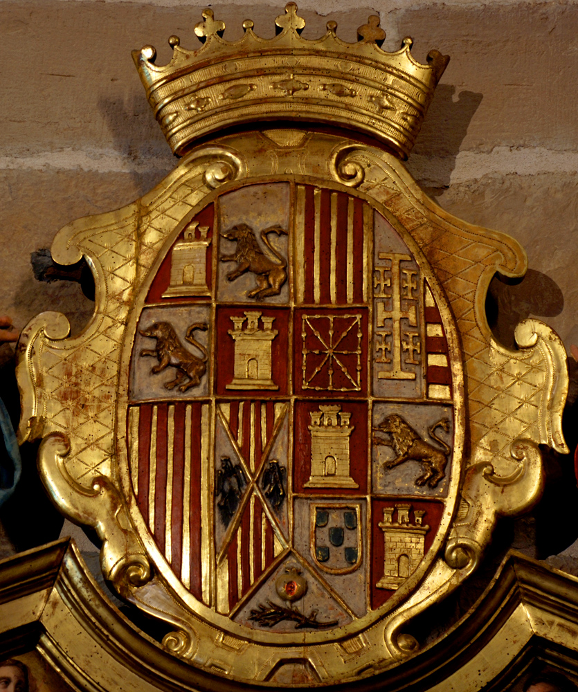 escudo Felipe II